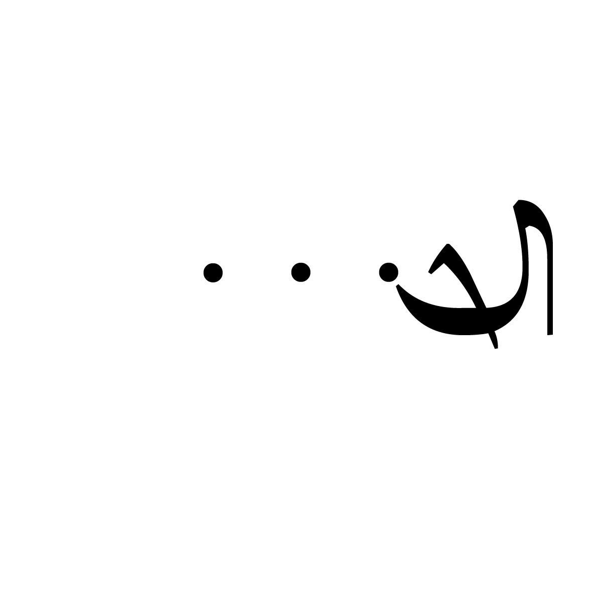 Balinese letter Ssa